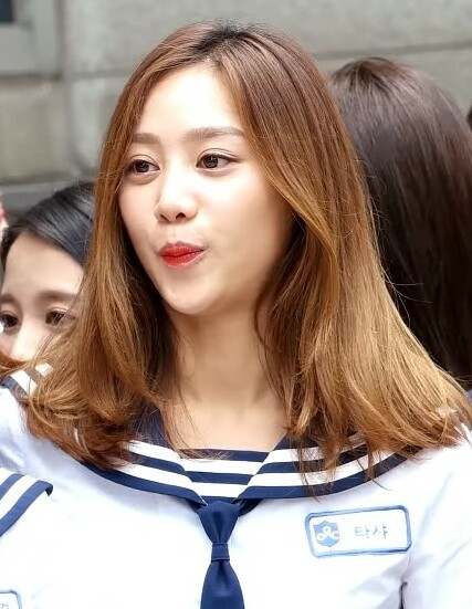 170712 홍대 걷고 싶은 거리 - 아이돌학교 퇴근